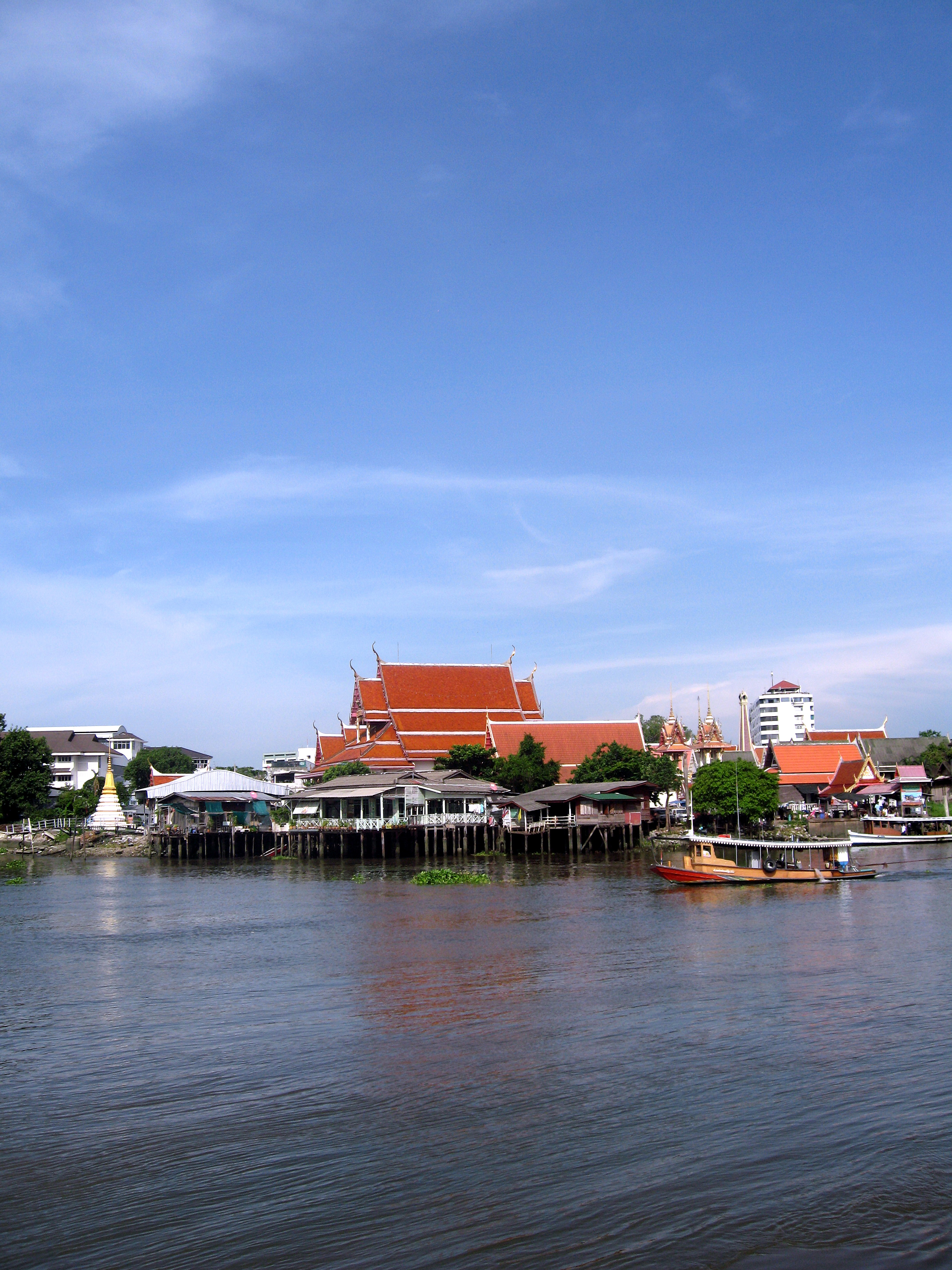 อีฟากหนึ่งมองจากเกาะเกร็ด